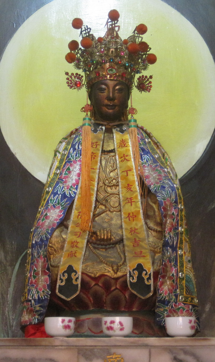 新化保生大帝宮觀音像